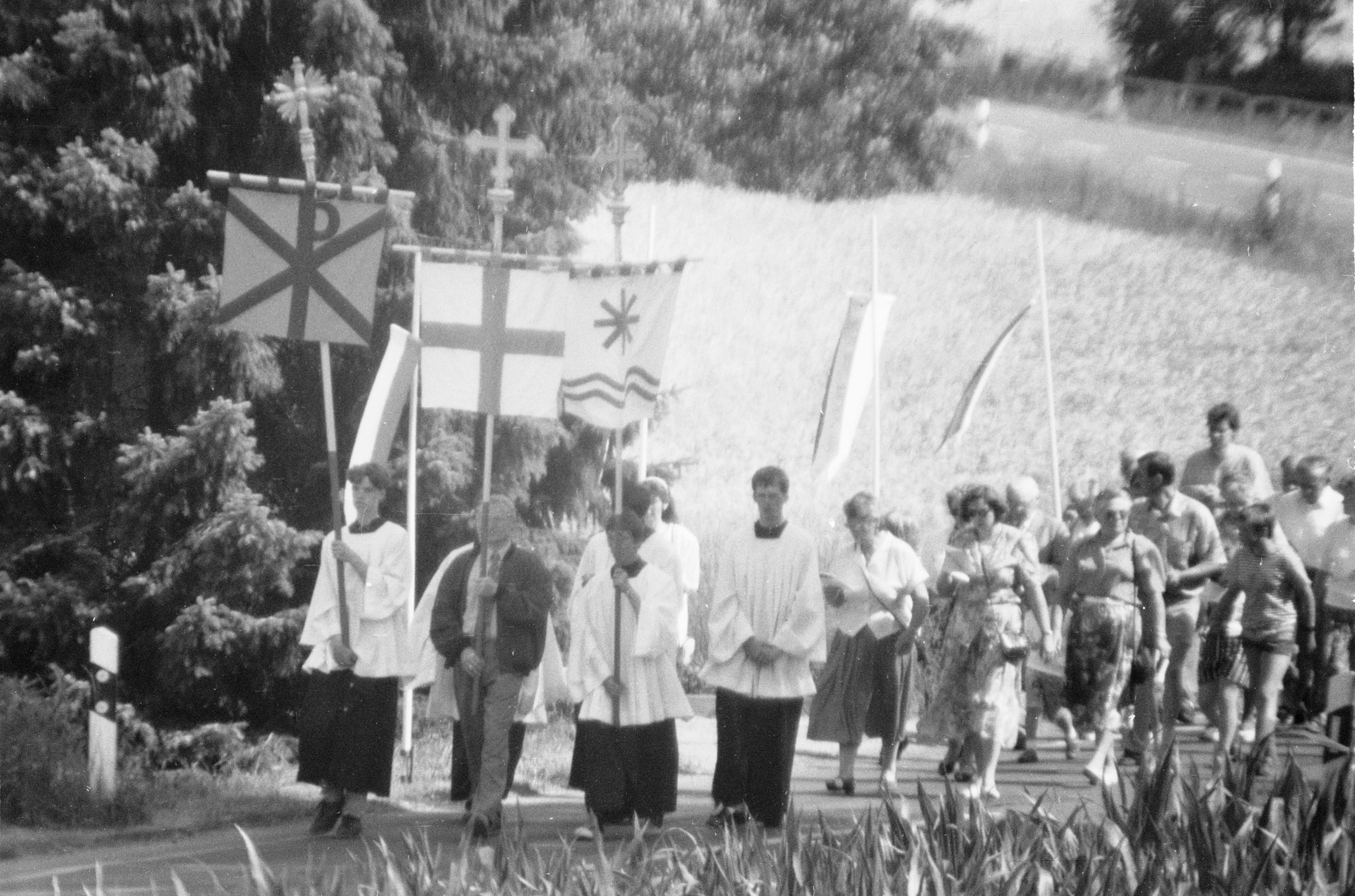 Die Hagelprozession in Ostbevern an der Marienkapelle